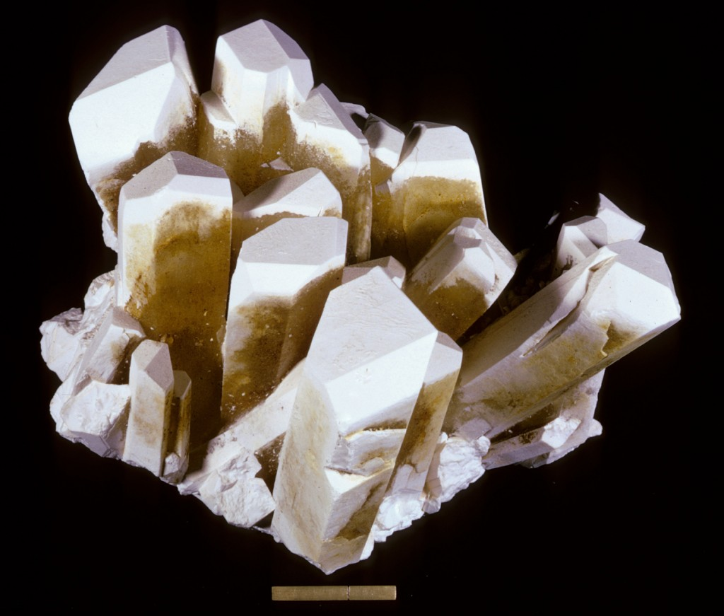 Tincalconit und Pseudomorphosen nach Borax. Weiße bis hell bernsteinfarbene Boraxkristalle wachsen in Sümpfen und auf den Böden der teilweise überschwemmten Sohlen in den alten Untertage-Borgruben. Manchmal sind die Kristalle prismatisch wie diese. Nach einiger Zeit wechseln sie jedoch in weiße Pseudomorphosen nach Borax. In dieser Stufe sind die Kristalle zur Hälfte umgewandelt. Fundort: Baker mine, U.S. Borax Mine (Pacific West Coast Borax; Pacific Coast Borax County; Boron Mine; U.S. Borax and Chemical Corp.; Kramer Mine; Baker Mine), Kramer Borate-Lagerstätte, Boron, Bezirk Kramer, Kern County, Kalifornien, USA Länge des Vergleichsmaßstabs am unteren Bildrand beträgt 1 Zoll (= 2,54 cm) mit einer Einkerbung bei einem Zentimeter.